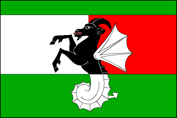 vlajka, Malhotice ,okres Přerov